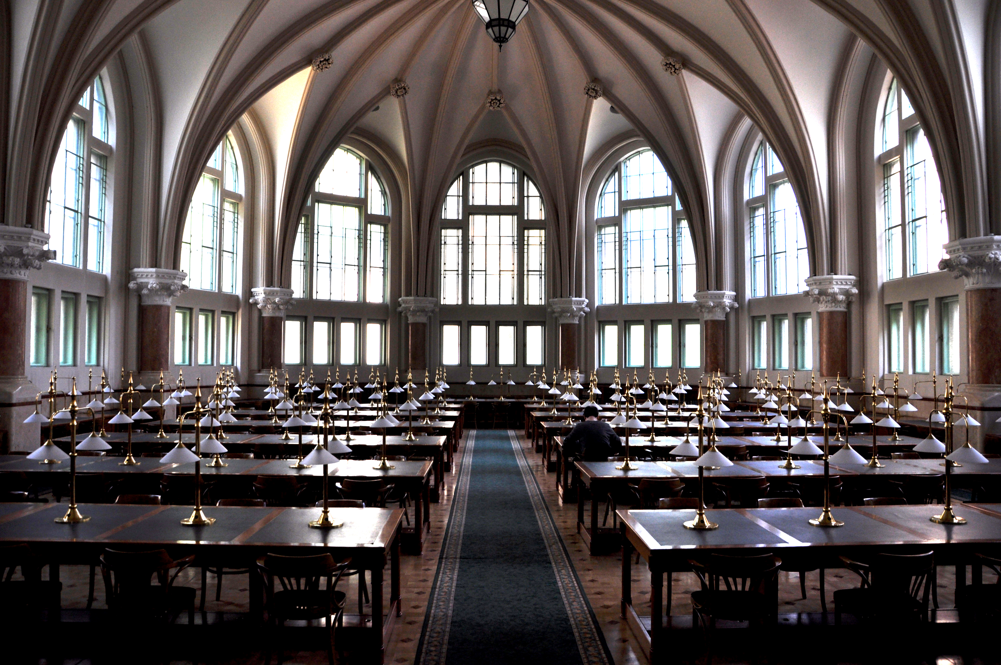 Budapesti Műszaki Egyetem könyvtárának olvasóterme This is a photo of a monument in Hungary. Identifier: 1110